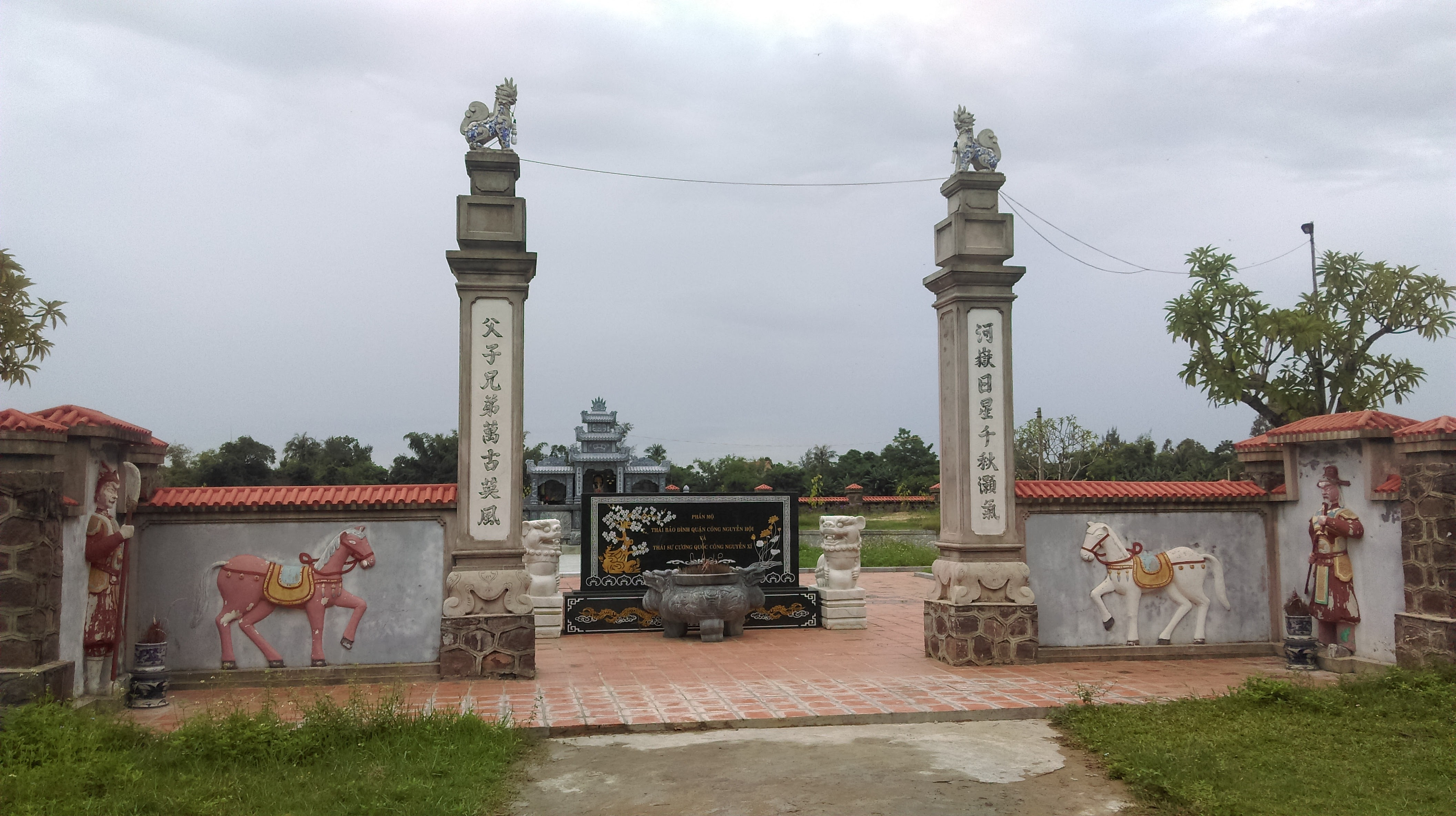 Phần mộ Nguyễn Xí